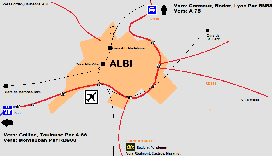 Plan générale du maillage routier et ferroviaire albigeois.